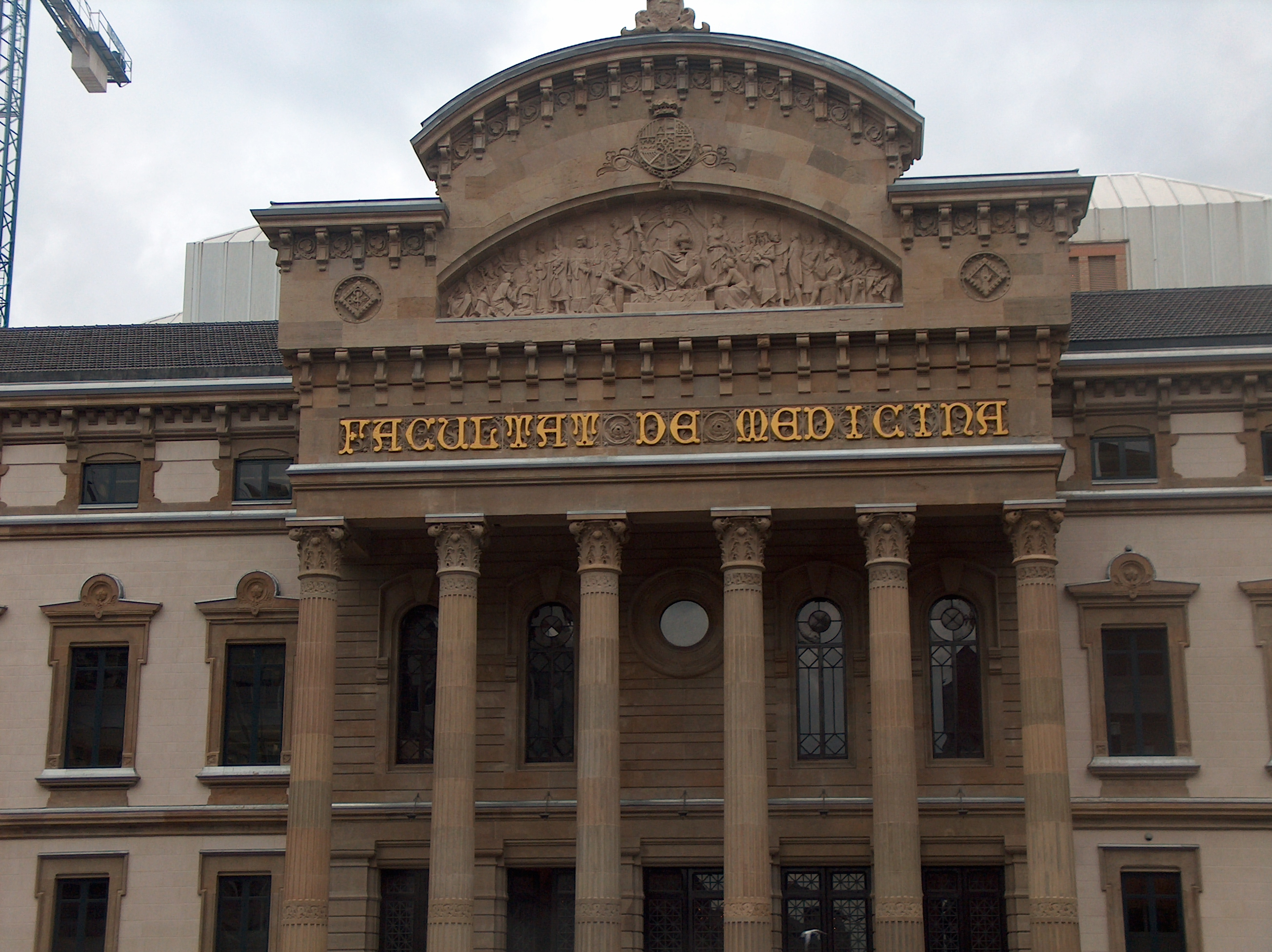 Facultat de Medicina de la Universitat de Barcelona situada al carrer Casanova